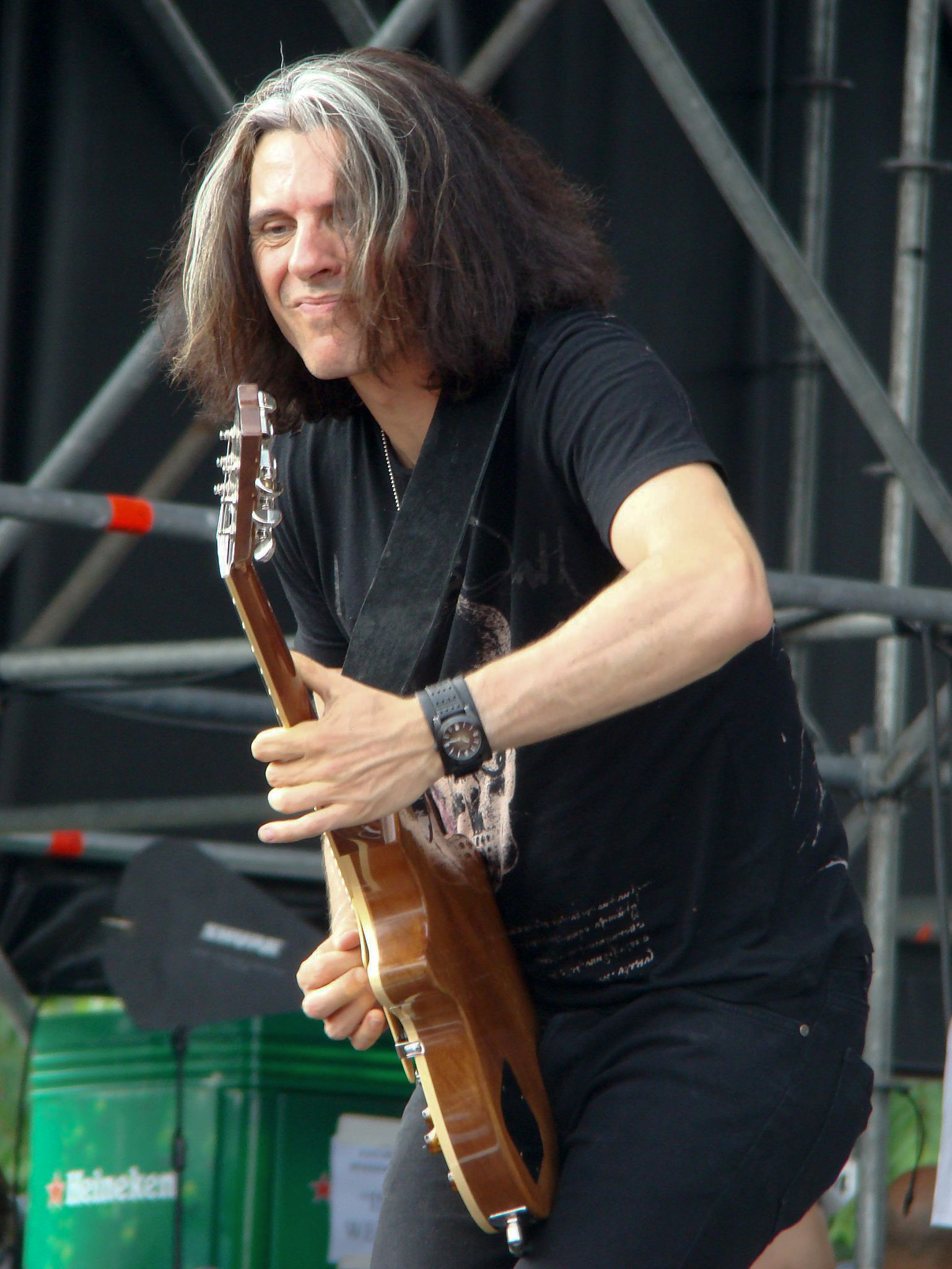 Testament's lead guitarist, Alex Skolnick.